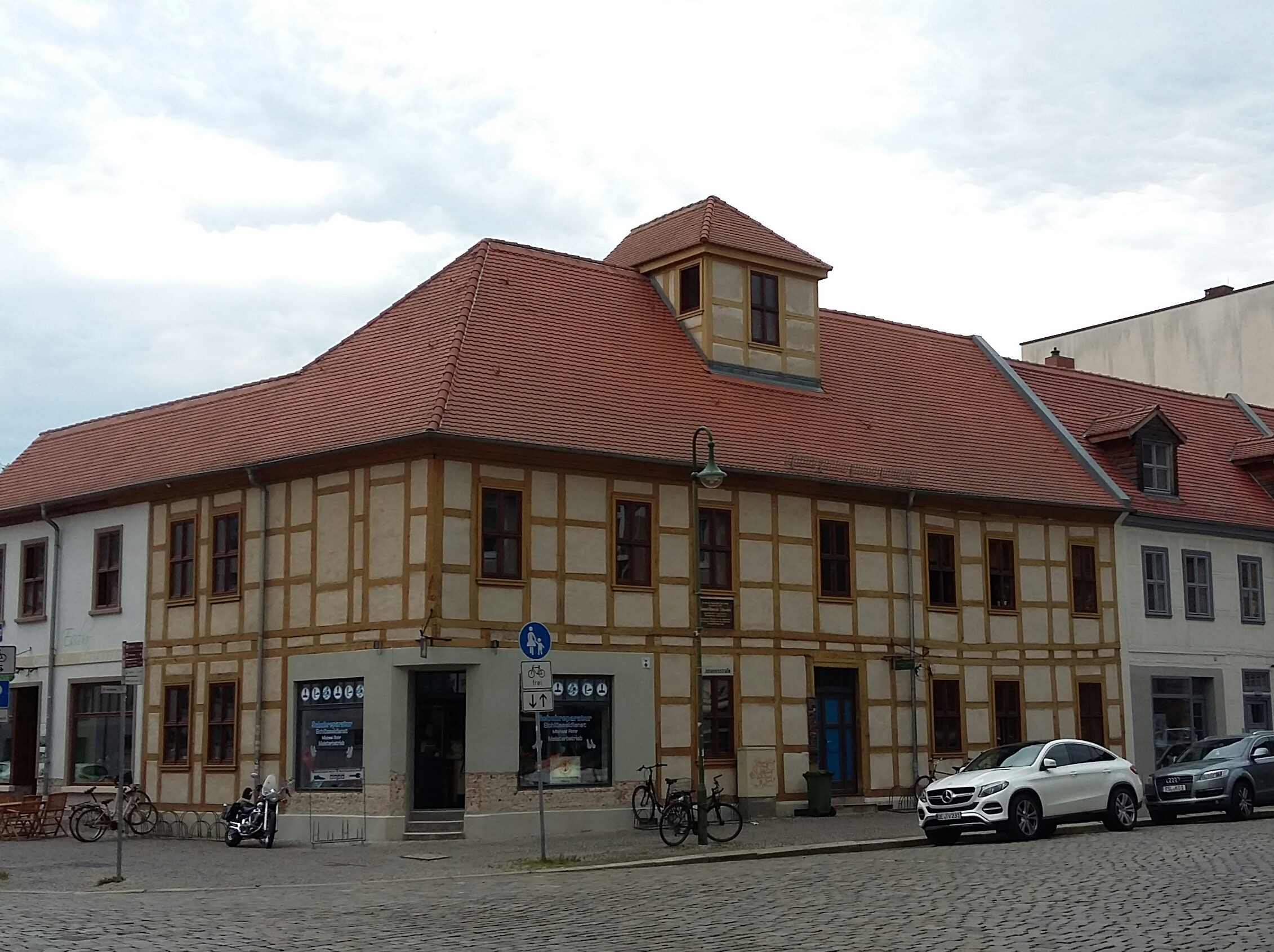 Schwabehaus Dessau